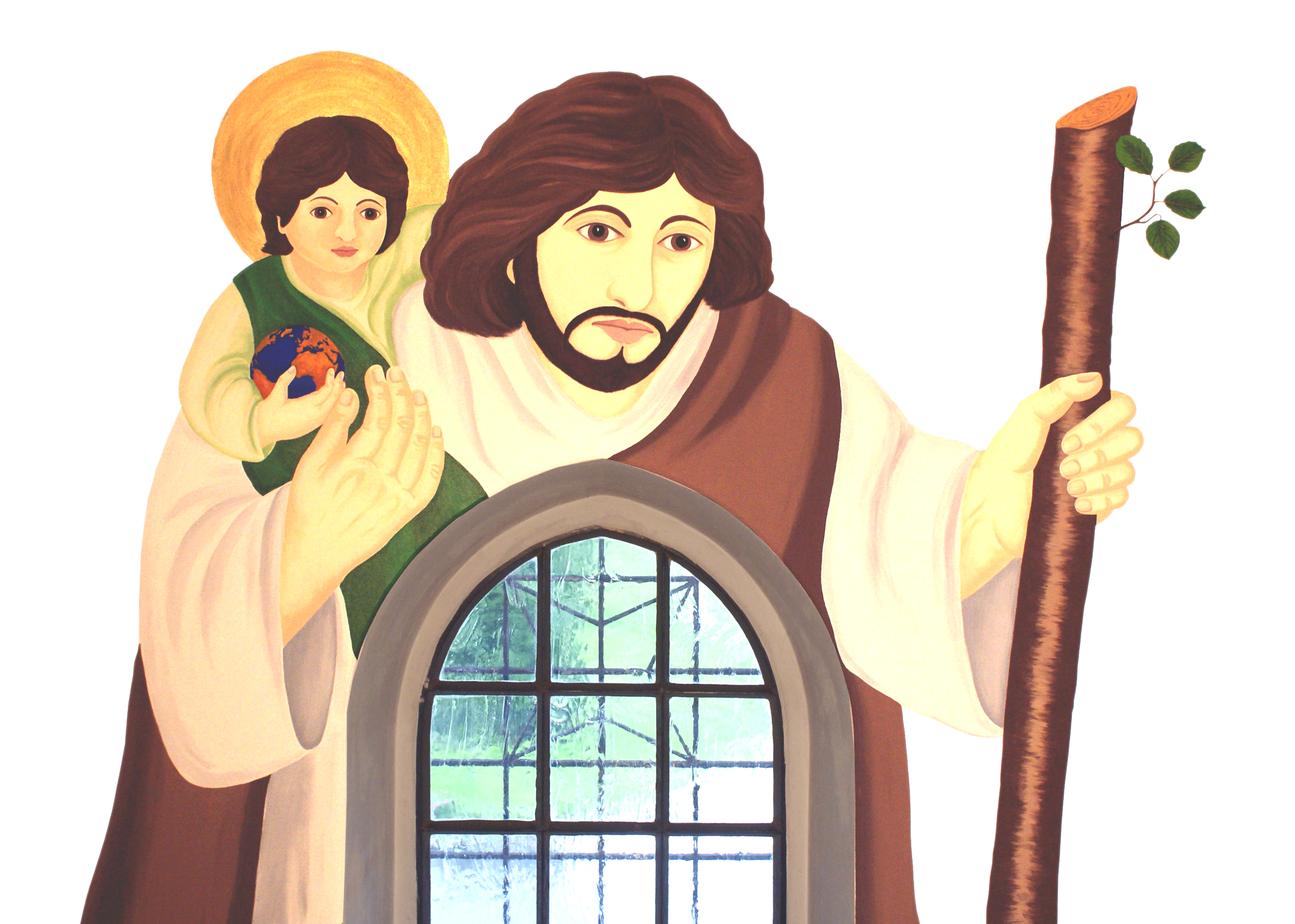 Römisch-katholische Kirche Niederhasli, Gemälde von Michaela Novotny